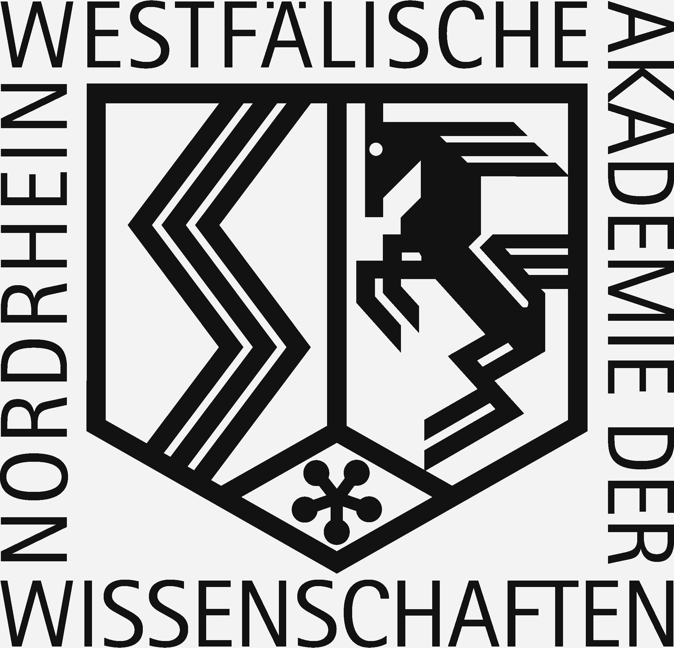 Logo der Nordrhein-Westfälischen Akademie der Wissenschaften und der Künste, Düsseldorf (AKDW NRW)